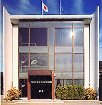 城東建設本社ビル